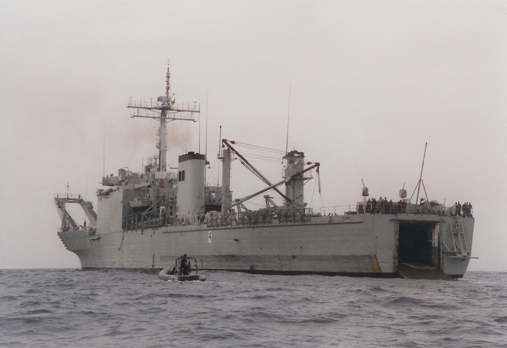 LST Pizarro (L-42), ex USS-Harlan County (L-1196). Clase Newport, de la Armada española